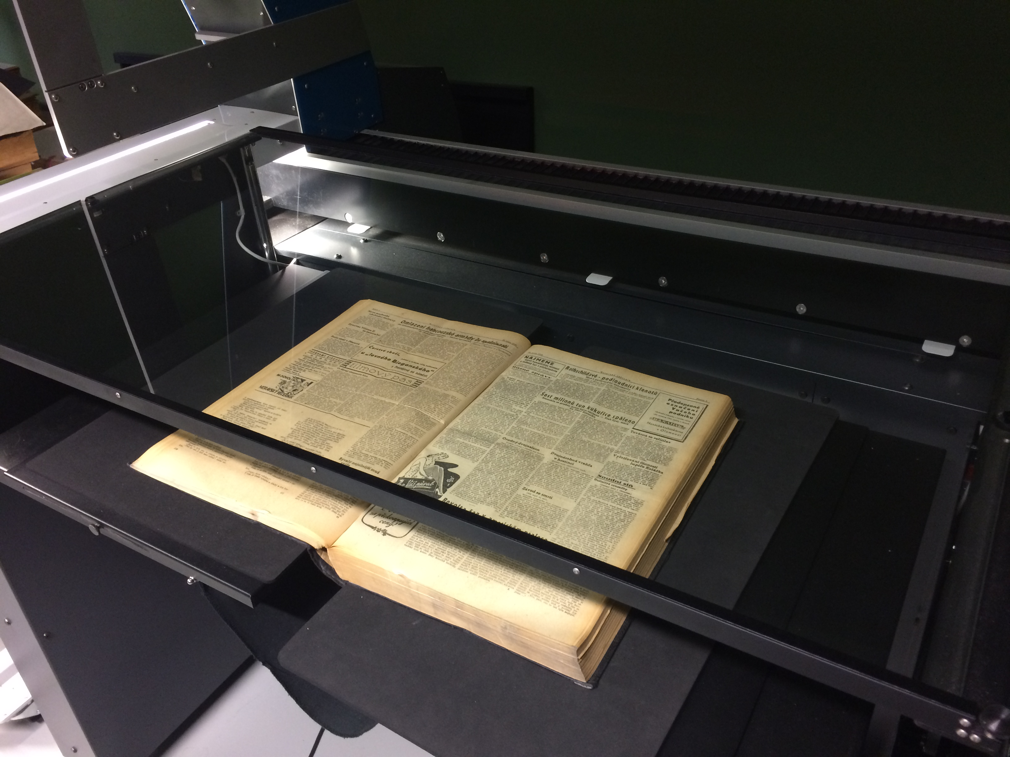 Velkoformátový scanner i2S DigiBook SupraScan Quartz A0 digitalizační jednotky ve Vědecké knihovně v Olomouci